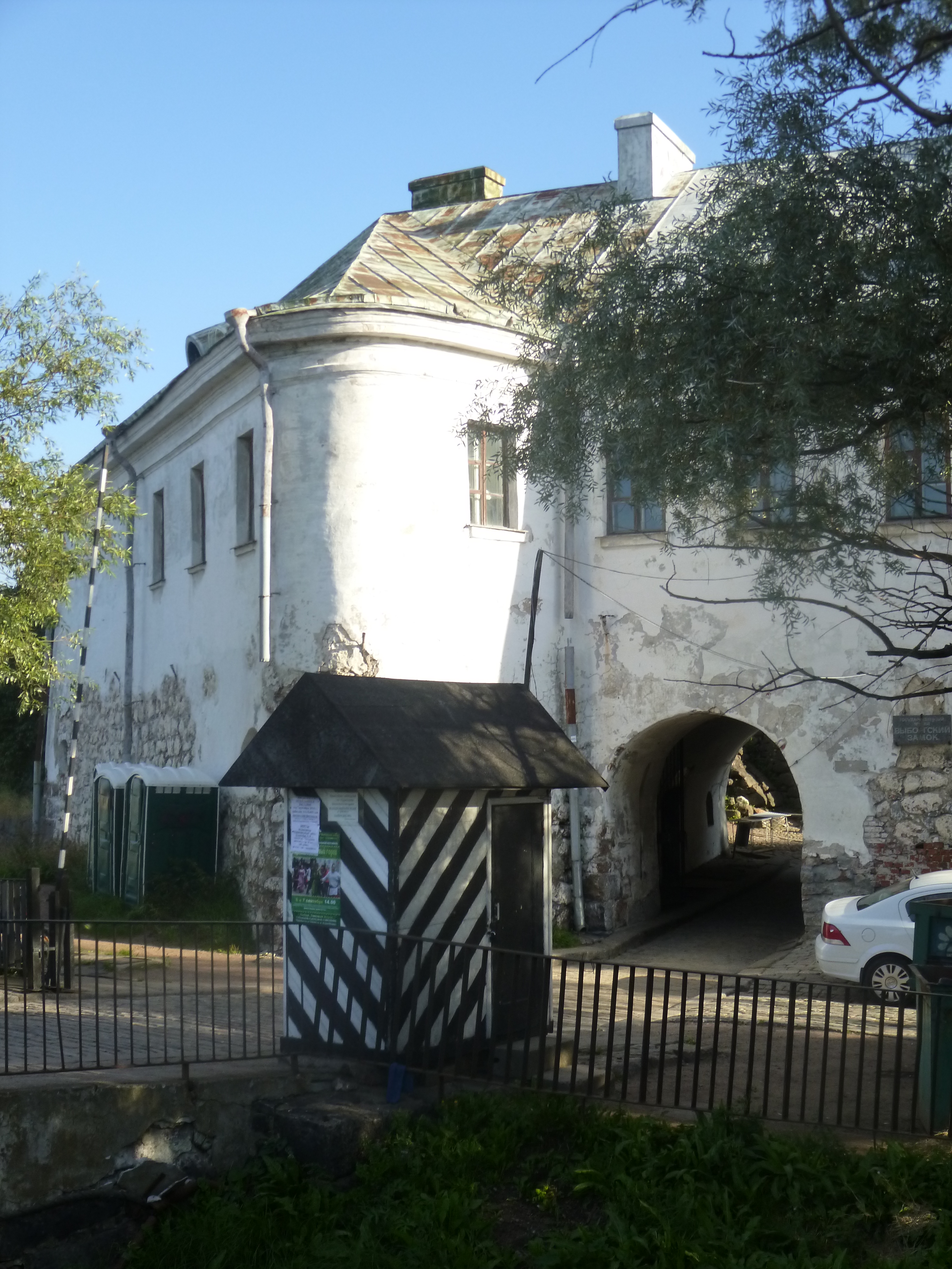 Дом наместника (Санкт-Петербург и Лен.область, Выборг, Выборгская слобода, о. Замковый)